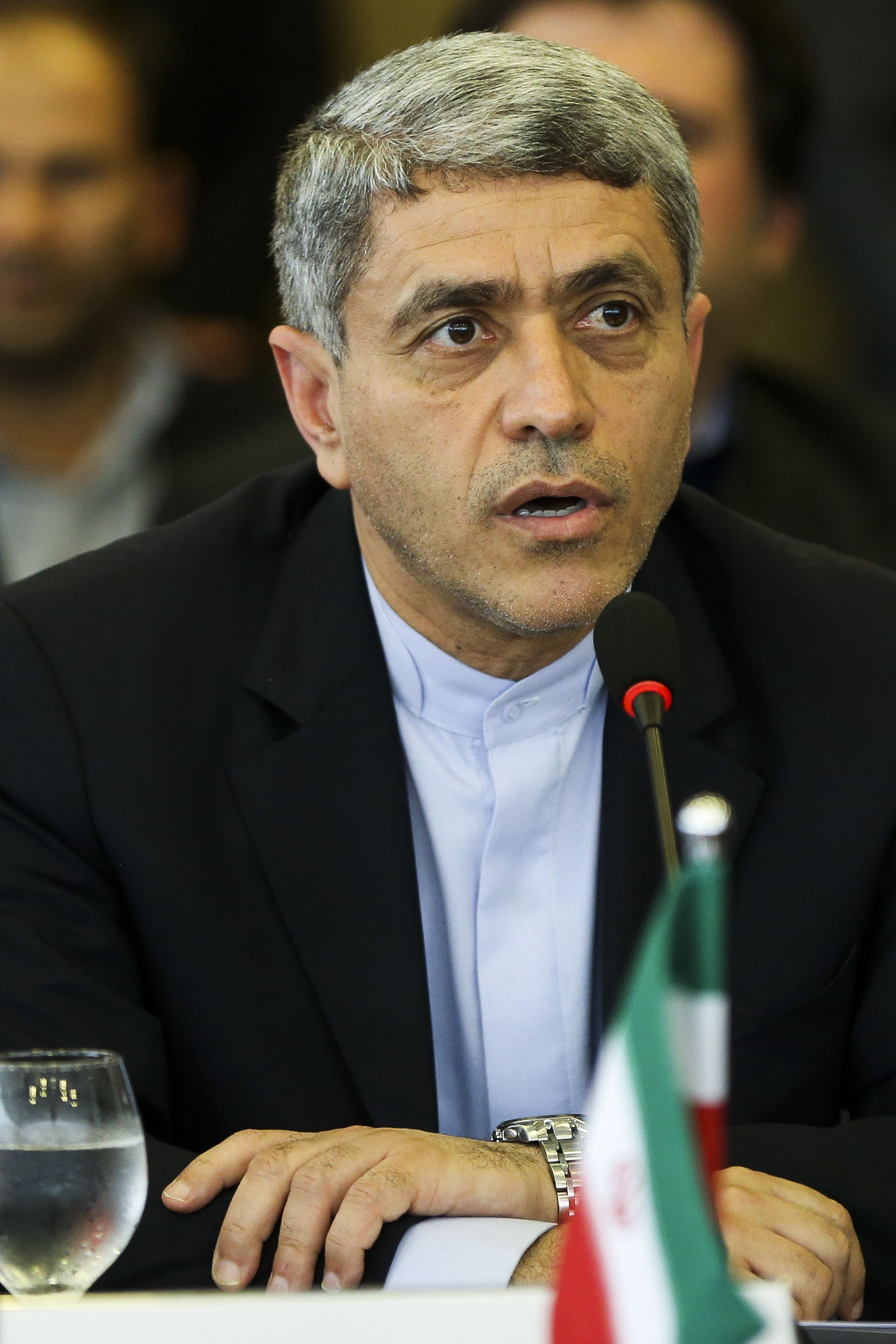 Brasília - O ministro de Assuntos Econômicos e Finanças do Irã, Ali Tayebnia, durante reunião da Comissão Econômico-comercial Bilateral Brasil-Irã.